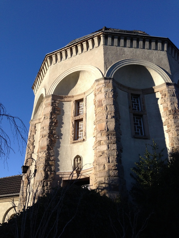 Krematorium DortmundThis is a photograph of an architectural monument., no. A 1037